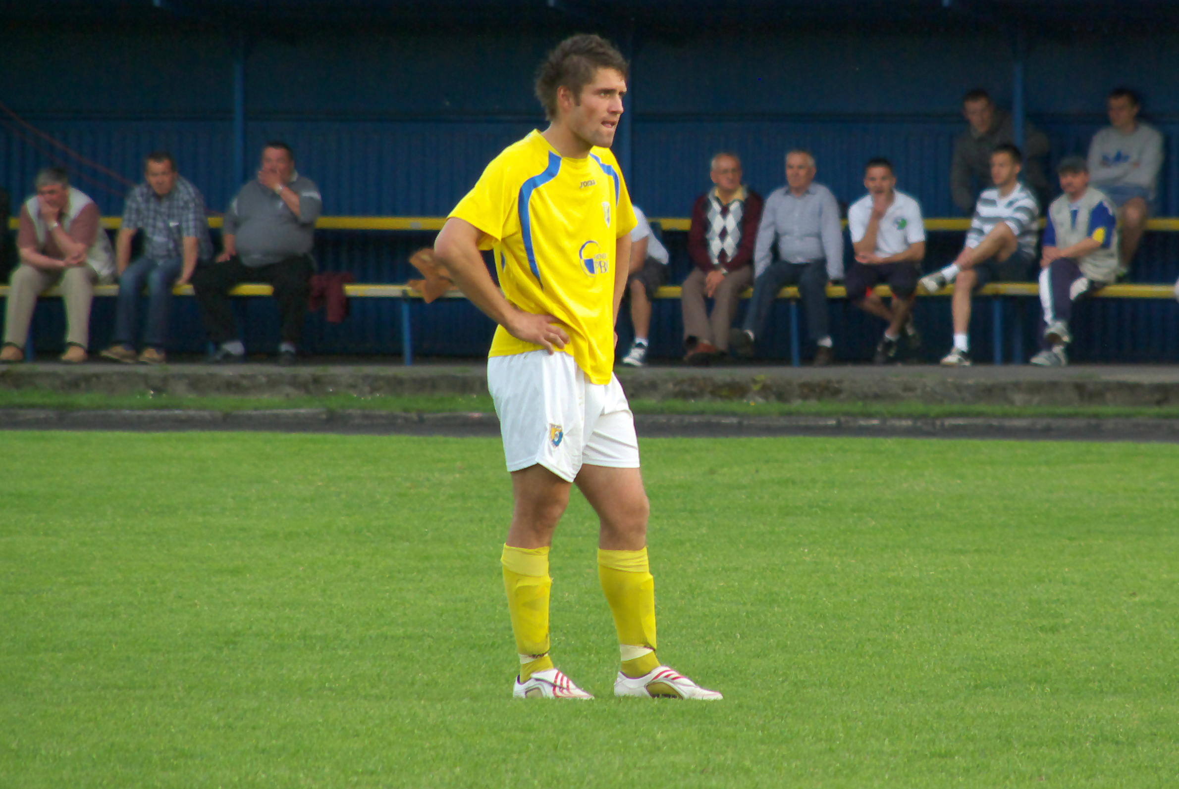 Fabian Pańko napastnik Stali Sanok